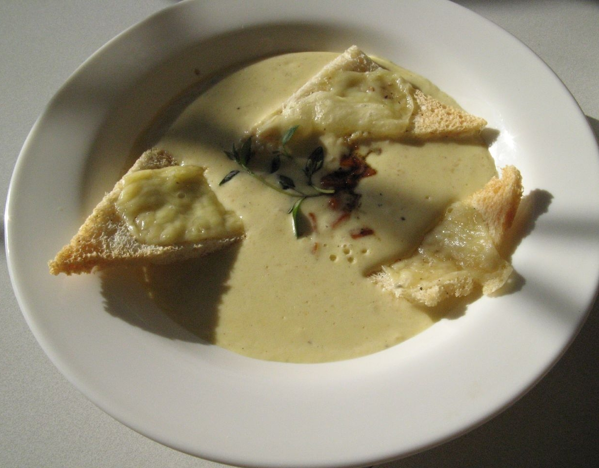 Photos from the "Starters and Desserts" course at Tallinn Service School. Photo for Nami-nami food blog. Fotod Tallinna Teeninduskooli kursuselt "Eel- ja järelroad". Foto Nami-nami retseptikogu jaoks.